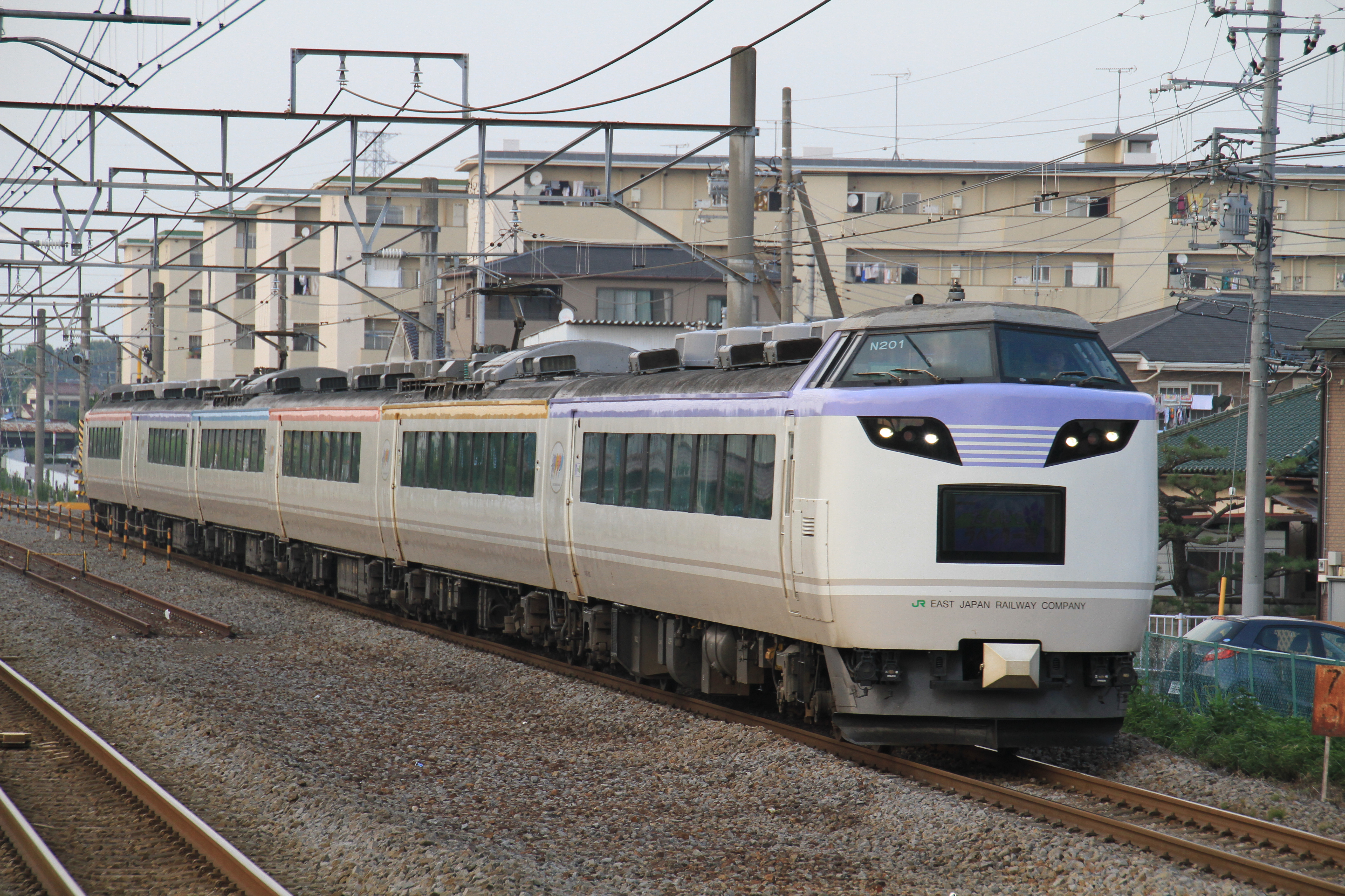 485系を使用したジョイフルトレイン「彩」